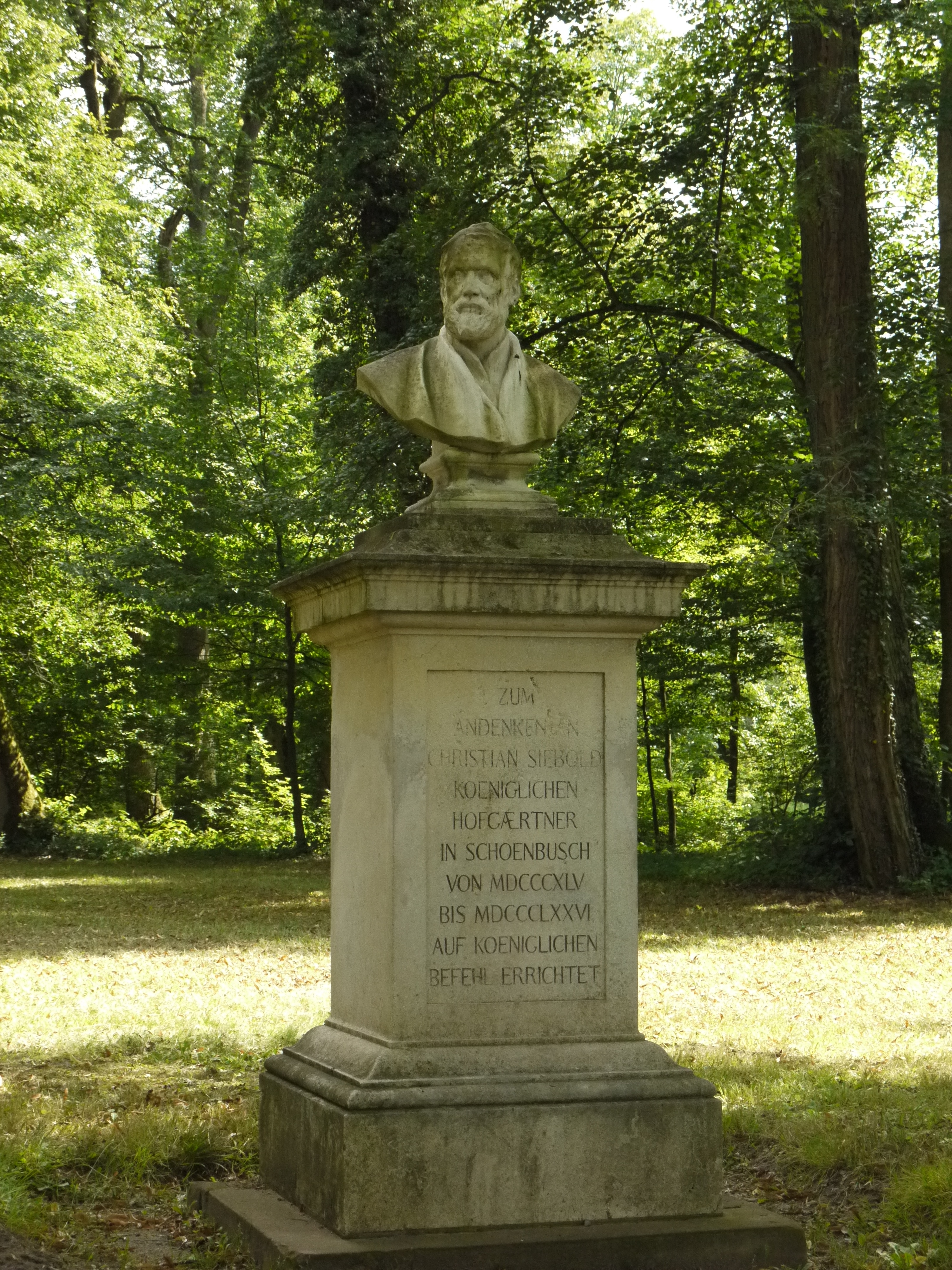 Denkmal des Hofgärtners Christian Heinrich Siebold (1806-1876) im Park Schönbusch